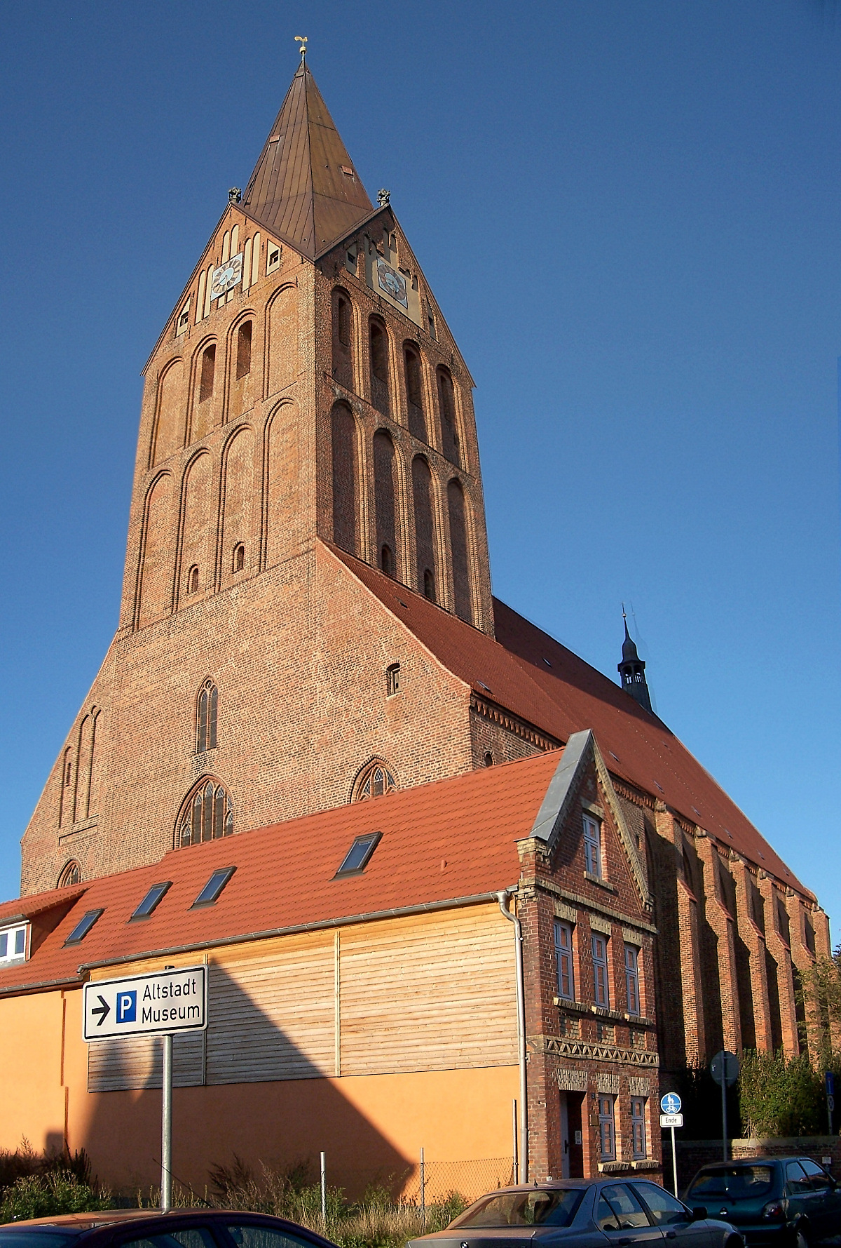 Kirche in Barth, Mecklenburg-Vorpommern